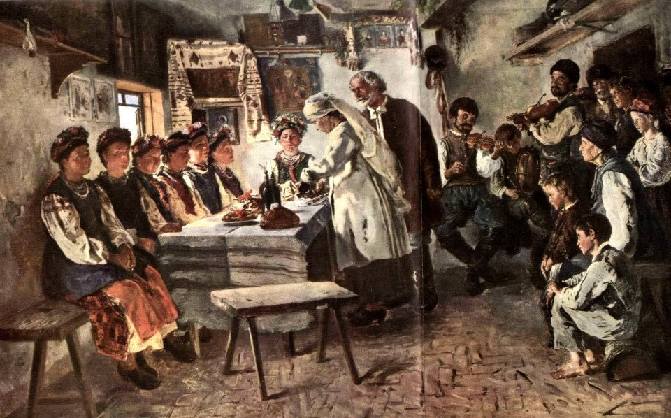 В.Маковський. Дівич-вечір. 1883. Полотно, олія. Музей російського мистецтва. Київ